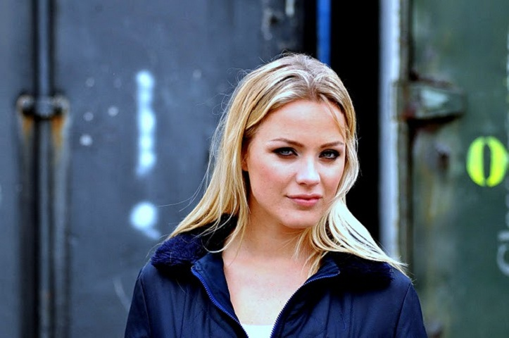 Tess Milne (Alkmaar, 2 januari 1988) is een Nederlands televisiepresentatrice die van februari tot en met december 2010 werkzaam was als VJ bij TMF en nu voor MTV presenteert.